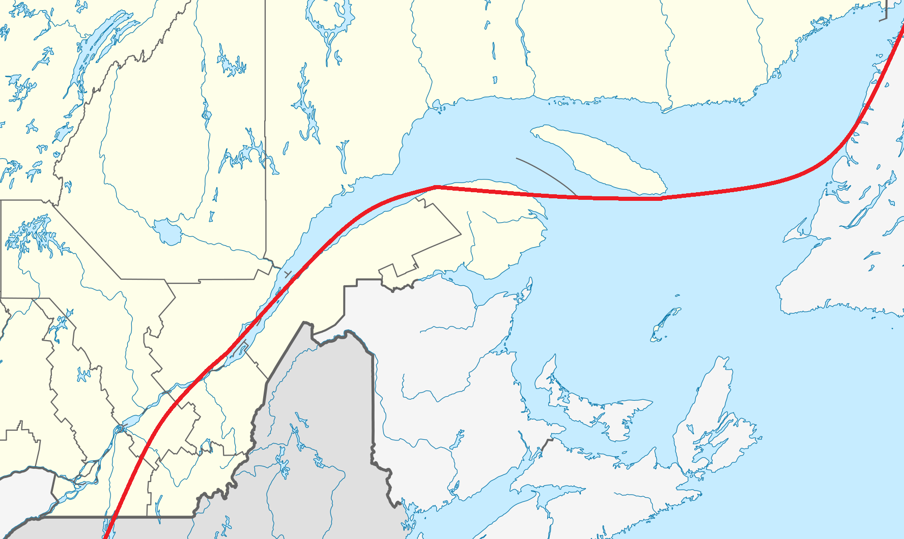 Faille de Logan (en rouge) sur la carte du Québec